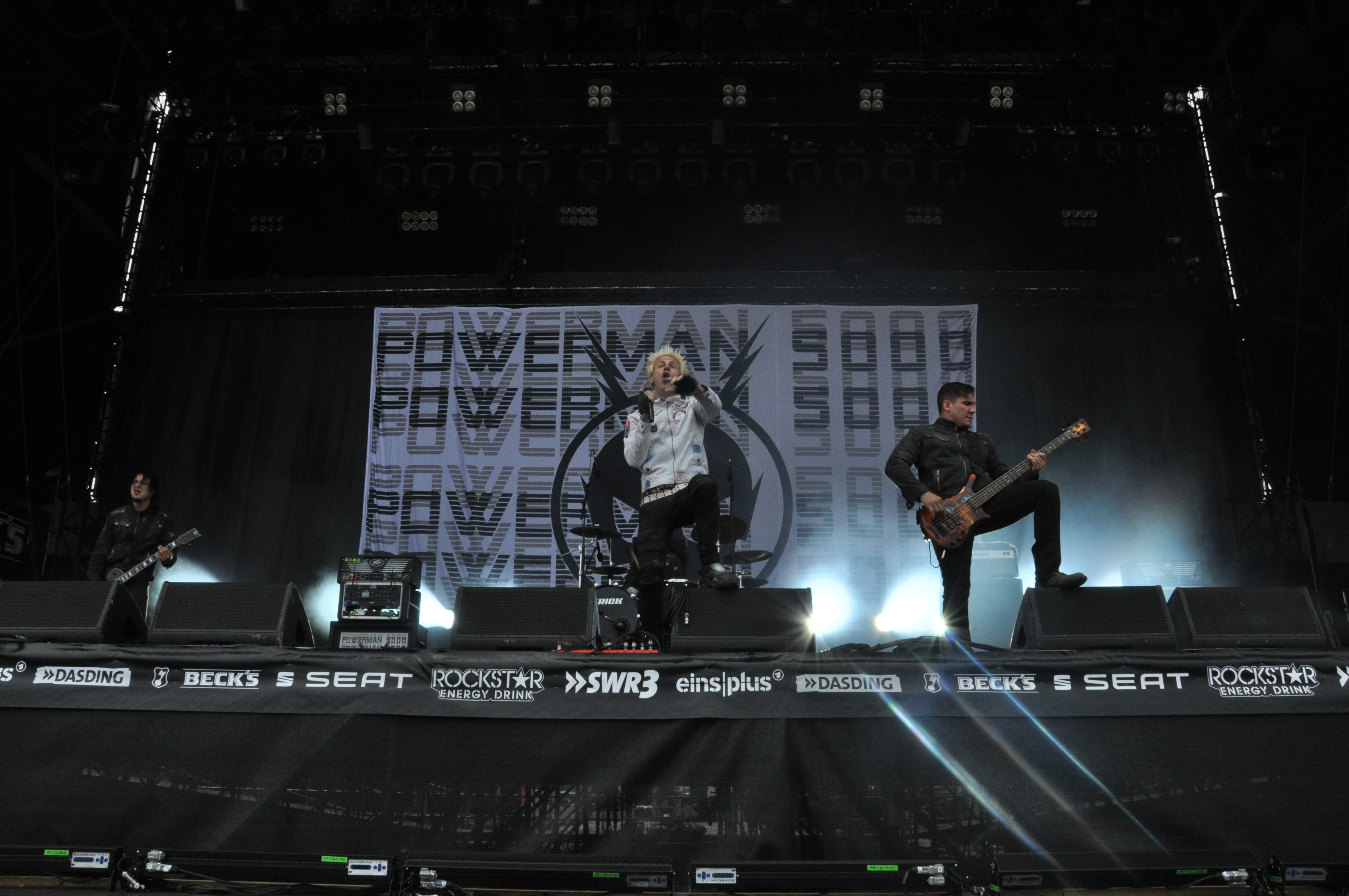 Powerman 5000 spielen auf der Alternastage bei Rock am Ring 2014